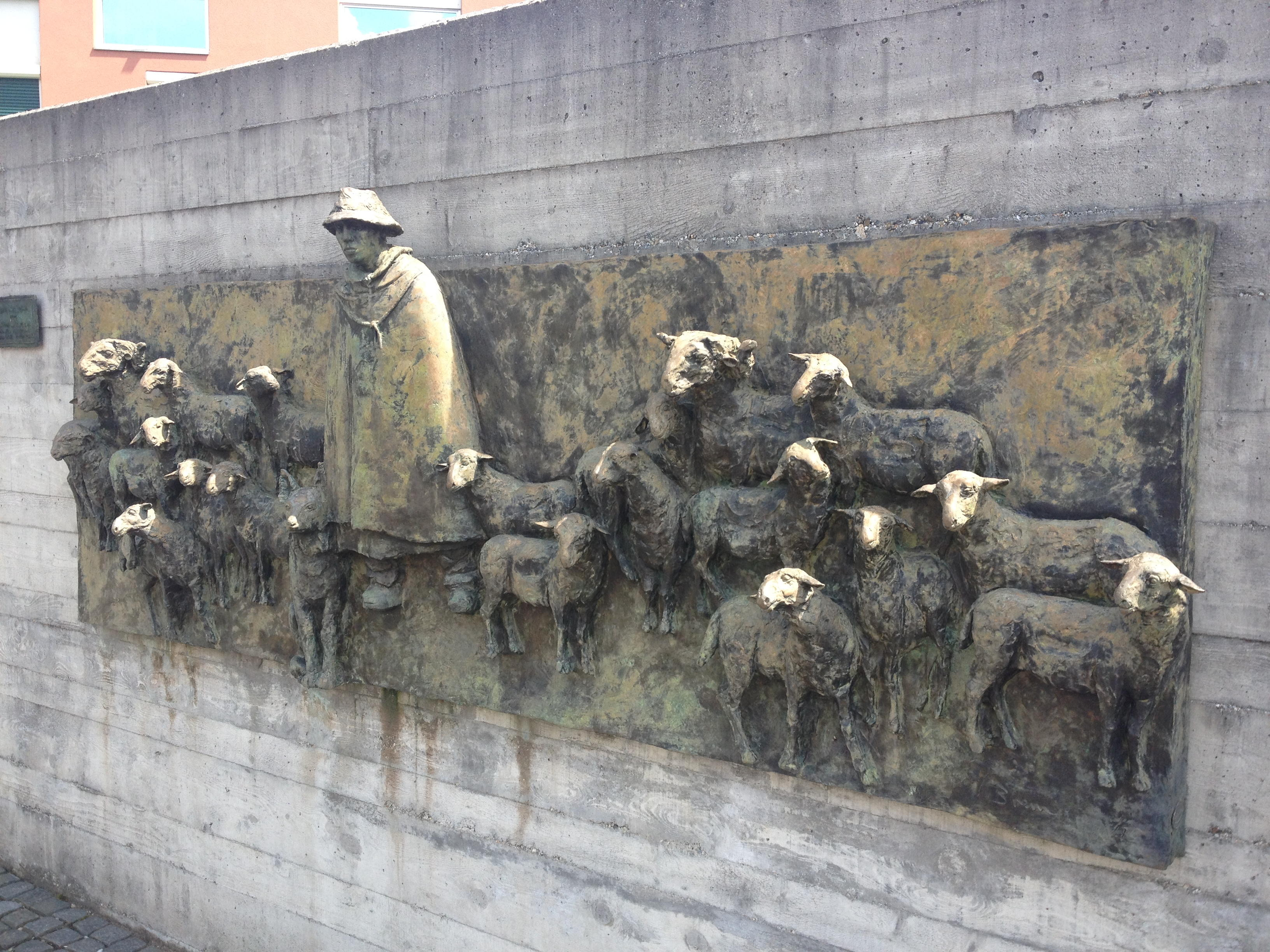 Relief Hirt und Herde vor dem Eingangsportal des Centro Evangelico Magliaso, Kanton Tessin, Schweiz, vom Luzerner Bildhauer und Plastiker Rolf Brem (1926-2014), Bronze 360 x 110 cm, Jahr 2002. (Neben den Schafen ist der Hirtenhund zur Rechten des Hirten zu beachten). Das Relief und die dazugehörende stützende Mauer wurden dem Centro Evangelico Magliaso gestiftet von Dr. phil. Hans-Ulrich Rübel (1919-2014), Zürich.